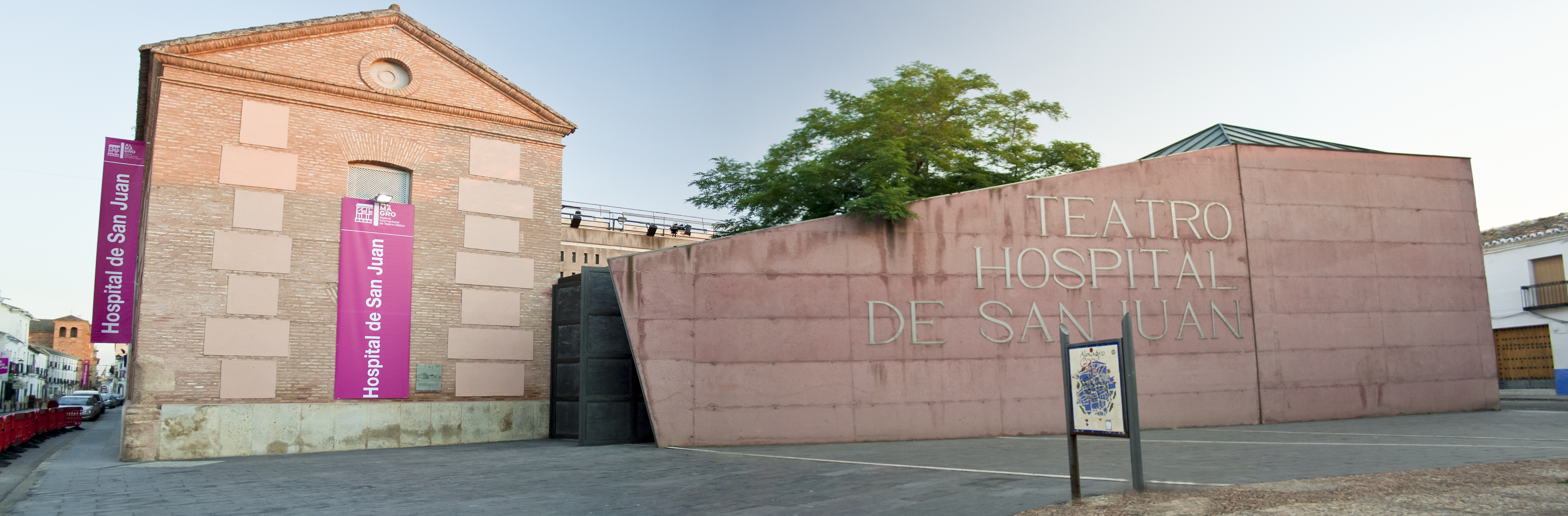 Fotografías de Guillermo Casas Baruque propiedad de la Fundación Festival Internacional de Teatro Clásico de Almagro.